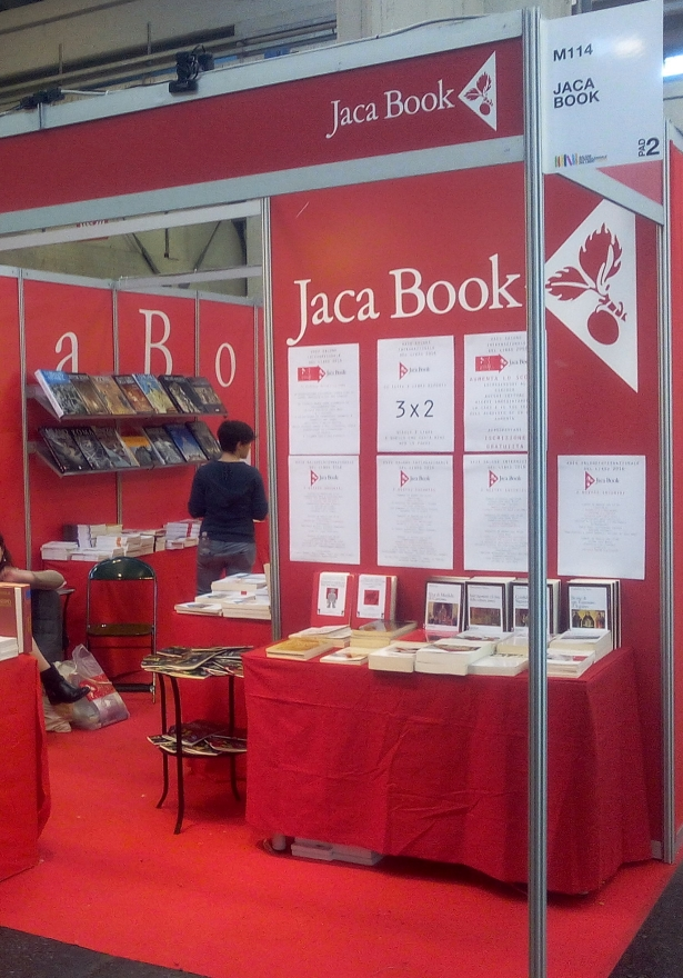 Stand edizioni Jaka Book - salone del libro 2016